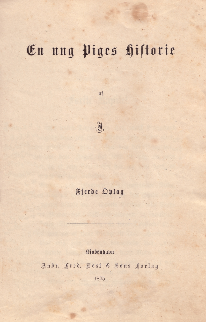 Side fra bogen "En ung Piges Historie" af Cornelia Levetzow - (1836 - 1921)